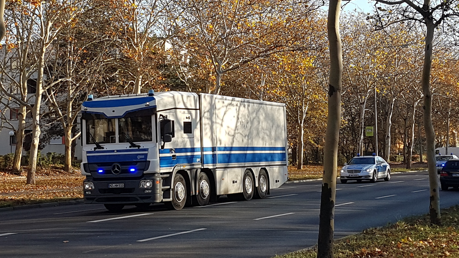 Werttransporter auf Mercedes-Benz Actros Basis der Deutschen Bundesbank in Begleitung von Polizeifahrzeugen.